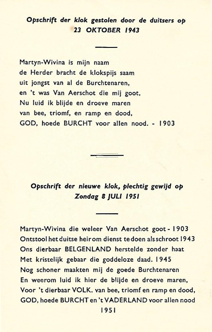 Steunkaart voor geteisterde kerk Sint-Martinus Burcht_achterzijde